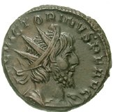 Portret van Gallo-Romeinse keizer Victorinus op een antoninianus (4.5g) uit 269/270, geslagen in Keulen.